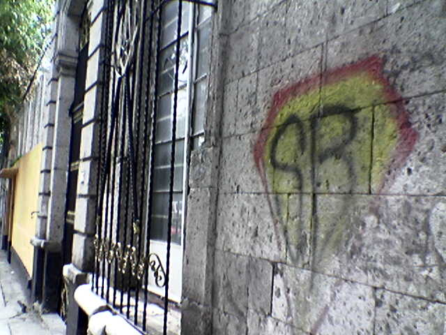 Superbarrio's sign, Santa Maria la Ribera, Mexico City